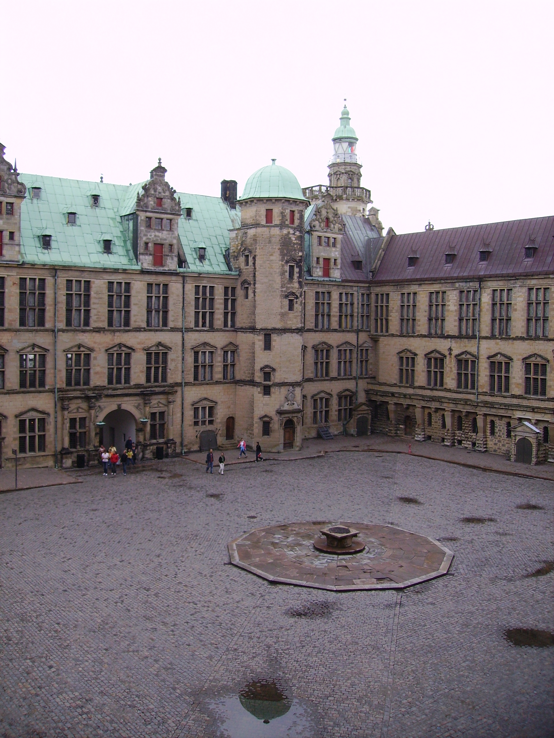 Kronborg Castle